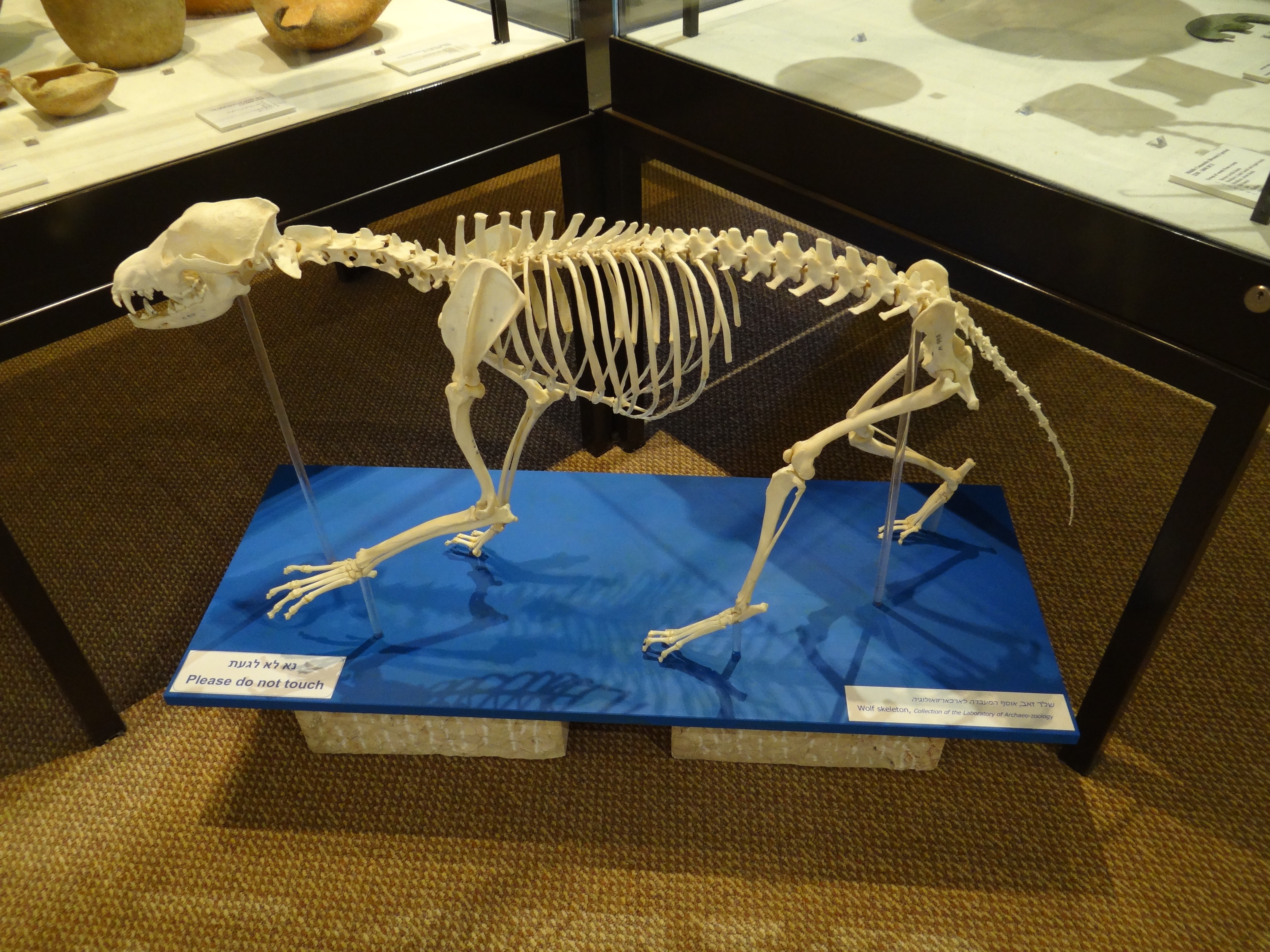 שלד של זאב אוסף המעבדה לארכאוזואולוגיה של החוג לארכאולוגיהבאוניברסיטת חיפה. הוצג בתערוכת "חכמת העצמות העתיקות" במוזיאון הכט